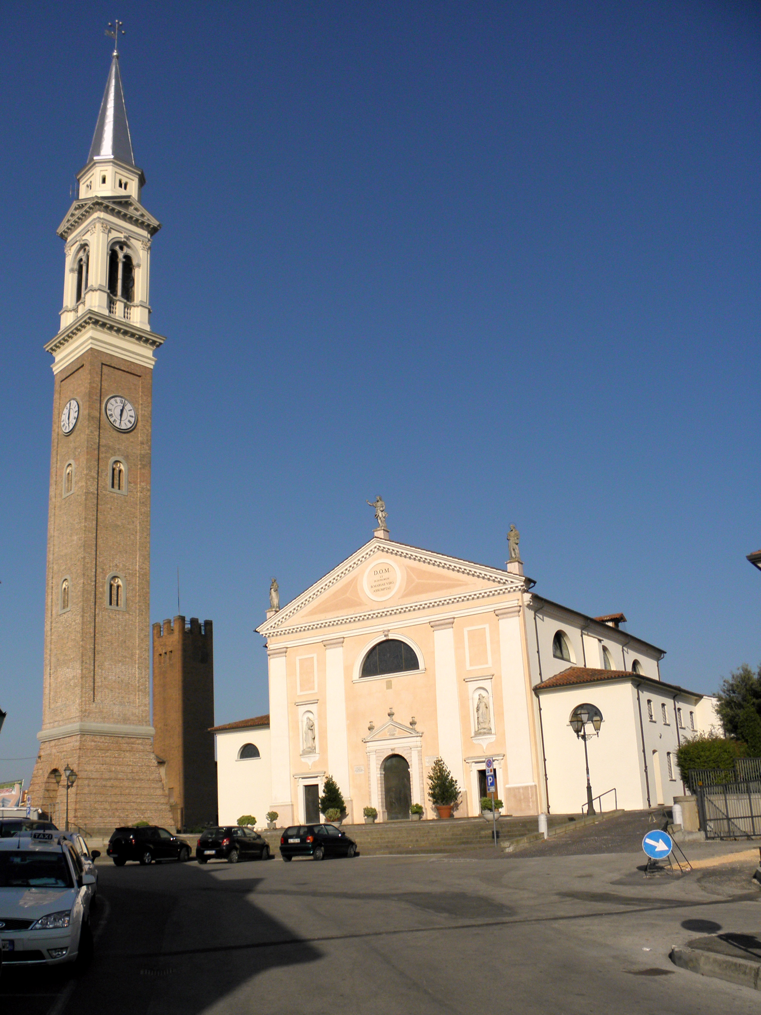 Solesino: la chiesa parrocchiale ed arcipretale di Santa Maria Assunta.